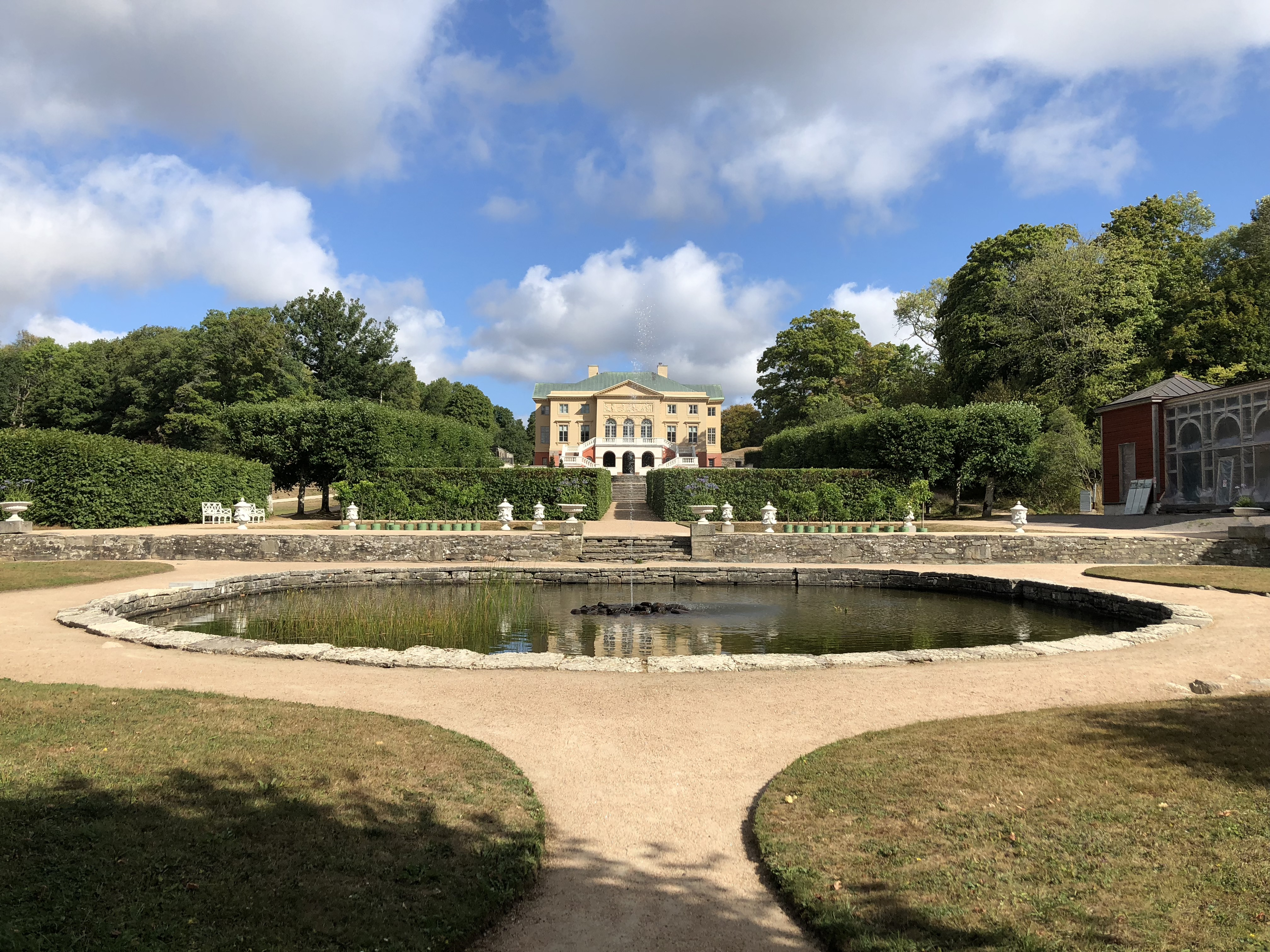 Gunnebo slott, södra stilträdgården samt slottets huvudfasad.